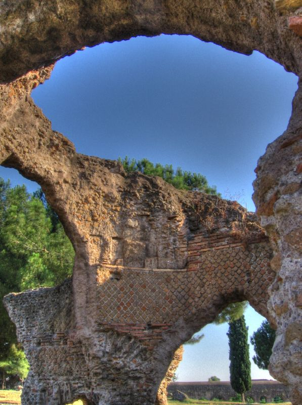 Roma, ItaliaHDR - Villa delle Vignacce 1